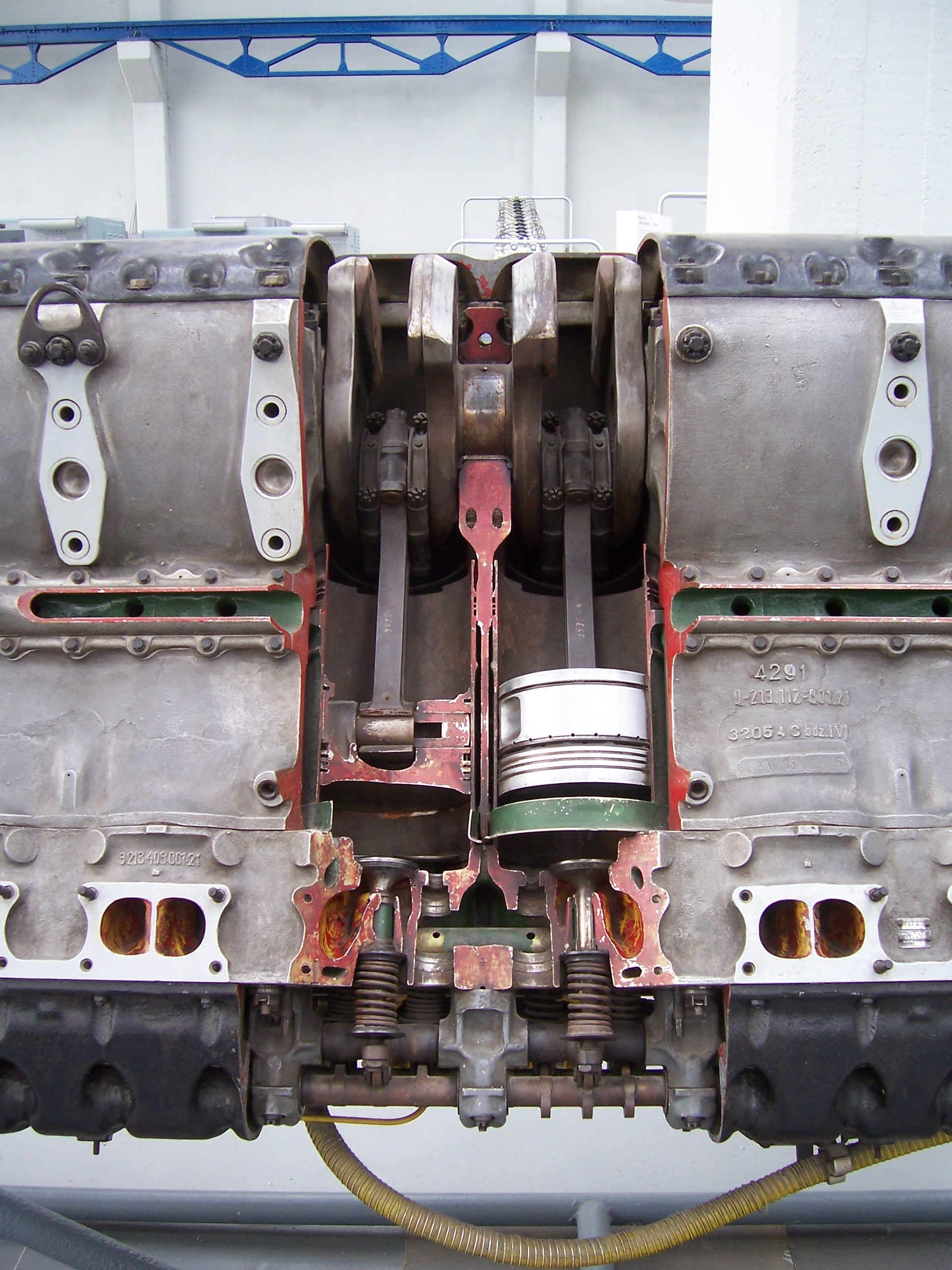 Jumo 213 A-G1 im Technikmuseum Hugo Junkers Dessau 2008-08-06